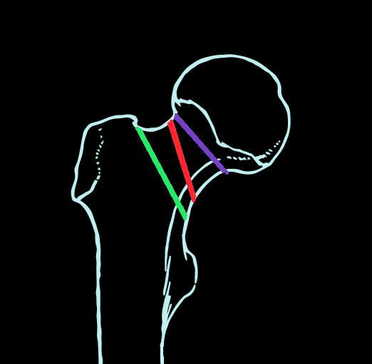 Darstellung der Frakturlinie medialer und lateraler SHF. violett: mediale subcapitale SHF, rot: mediale transzervikale SHF, grün: laterale SHF